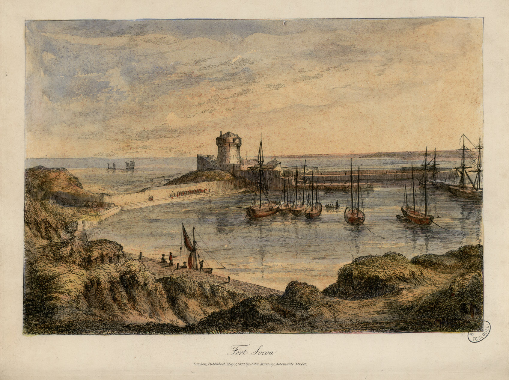 25 gravures sur cuivre aquarellées, 1 carte dessinée et gravée par B. R. Baker, imprimée par Rowney et Forster, lettre par J. Netherclift. - Toutes portent la mention : London, published May 1823, by John Murray, Albemarle Street. Il existe une traduction française, dactylographiée, réalisée par Renée Fourcade et déposée au Musée Basque de Bayonne. Il existe une traduction française, dactylographiée, réalisée par Renée Fourcade et déposée au Musée Basque de Bayonne. Double en couleurs du A-BATTY (1) Ancely, René (1876 - 1966). Possesseur